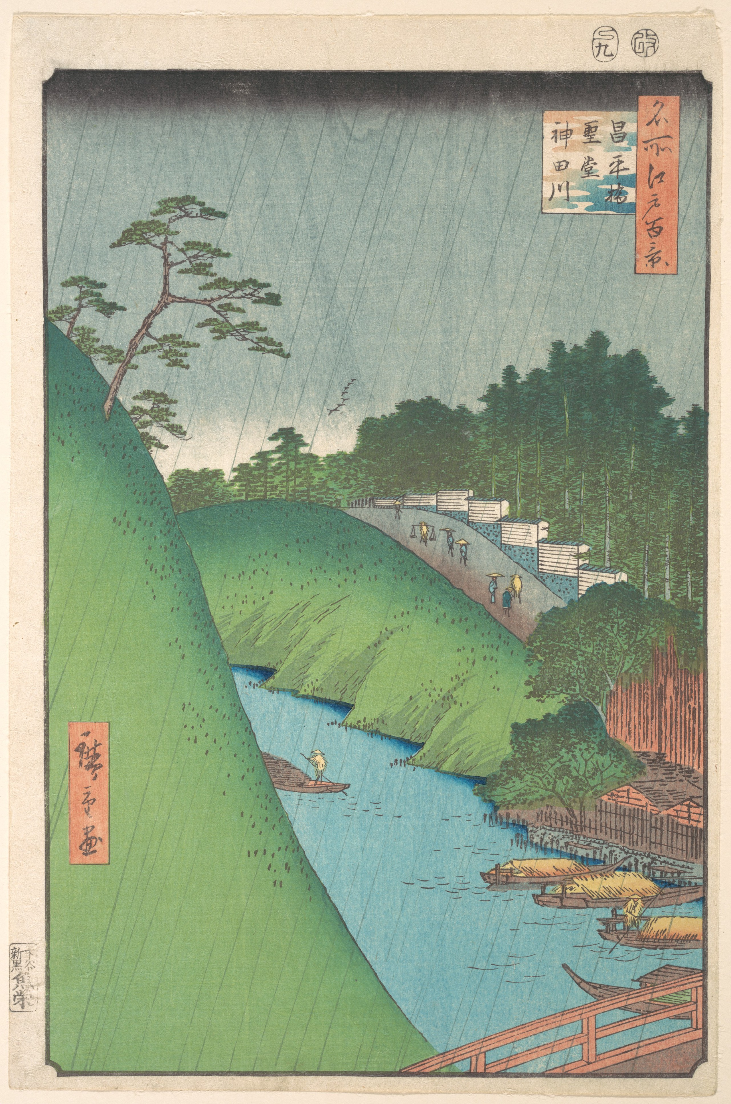 Japan; Print; Prints